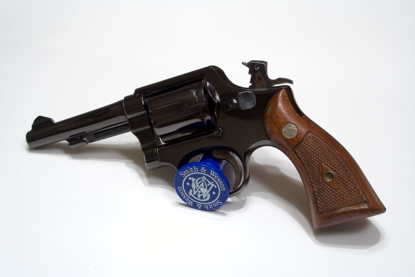 S&W Model 10 from 1962